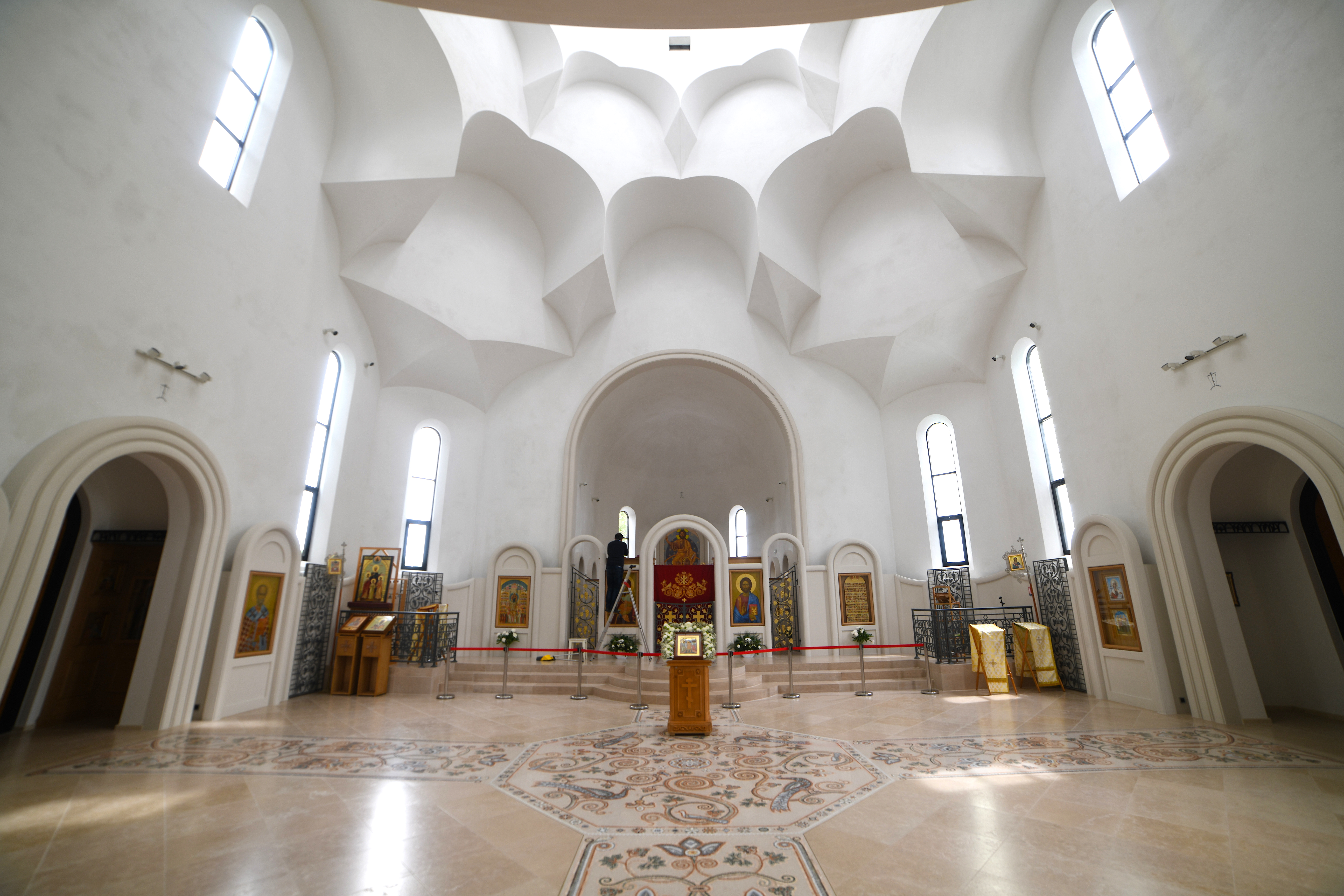 Vue de Intérieur